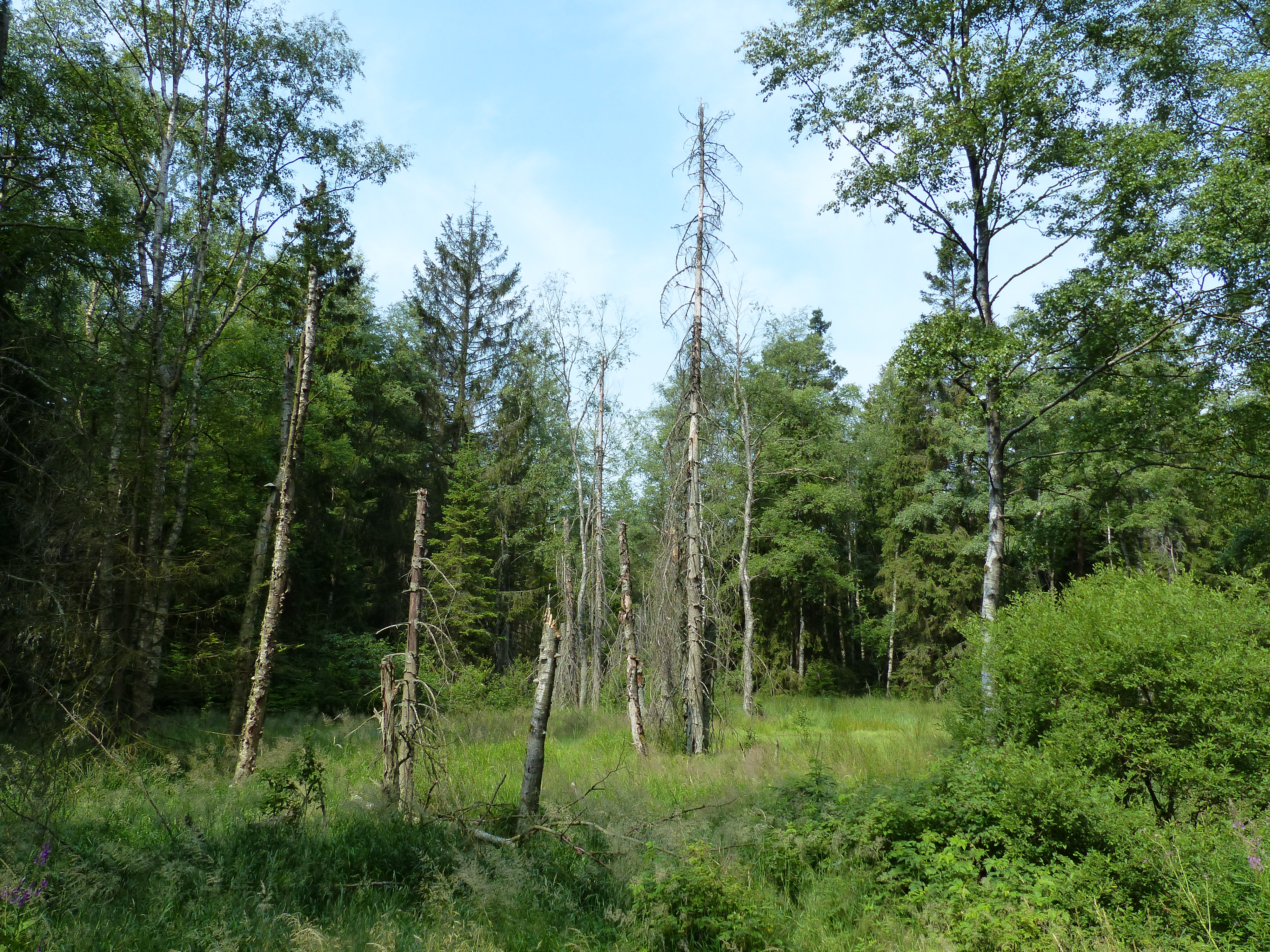 Ansicht im Hochmoor Torfmoorhölle bei Weißenstadt